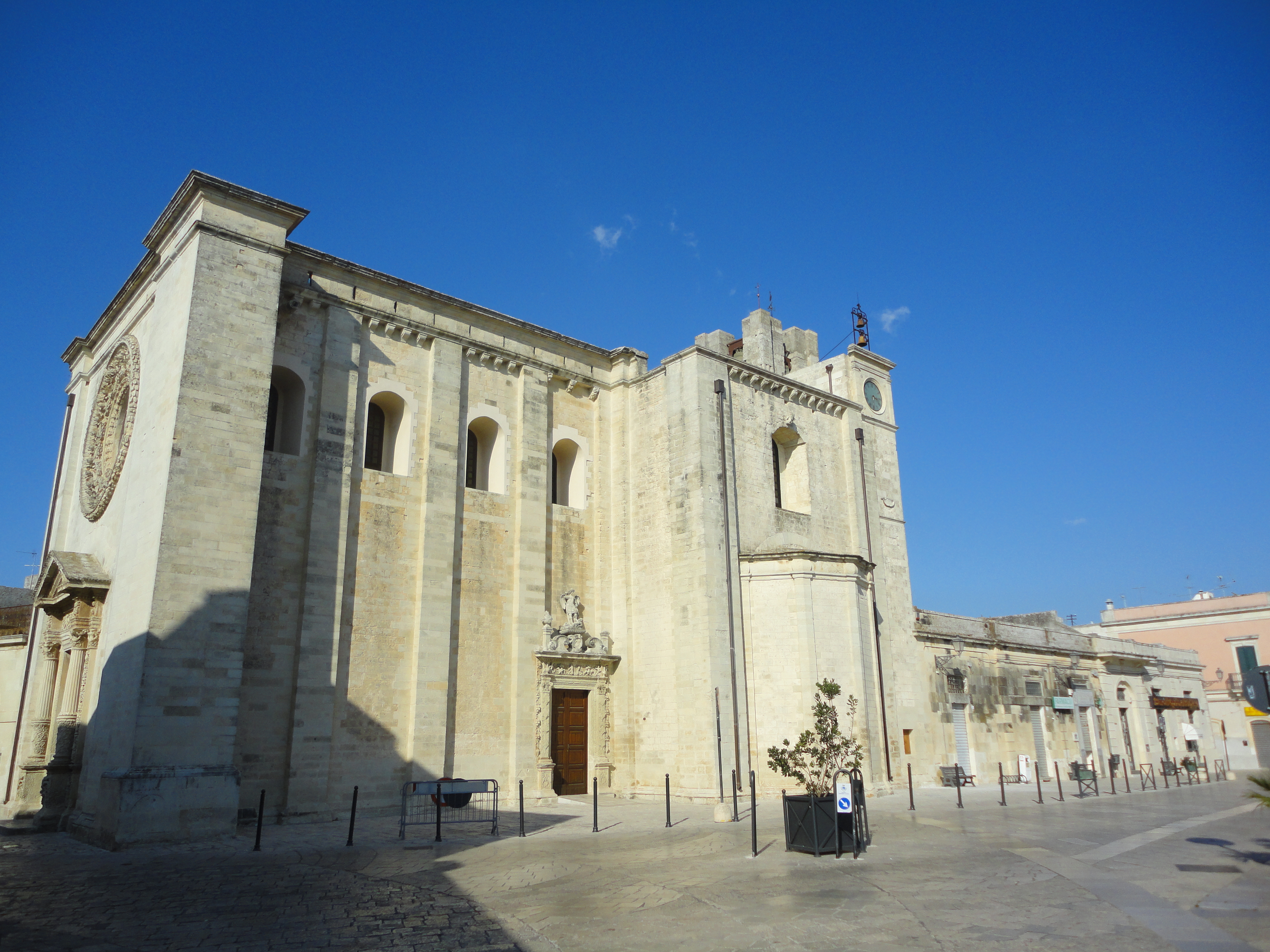 Piazza Umberto I Minervino di Lecce, Lecce, Puglia, Italy